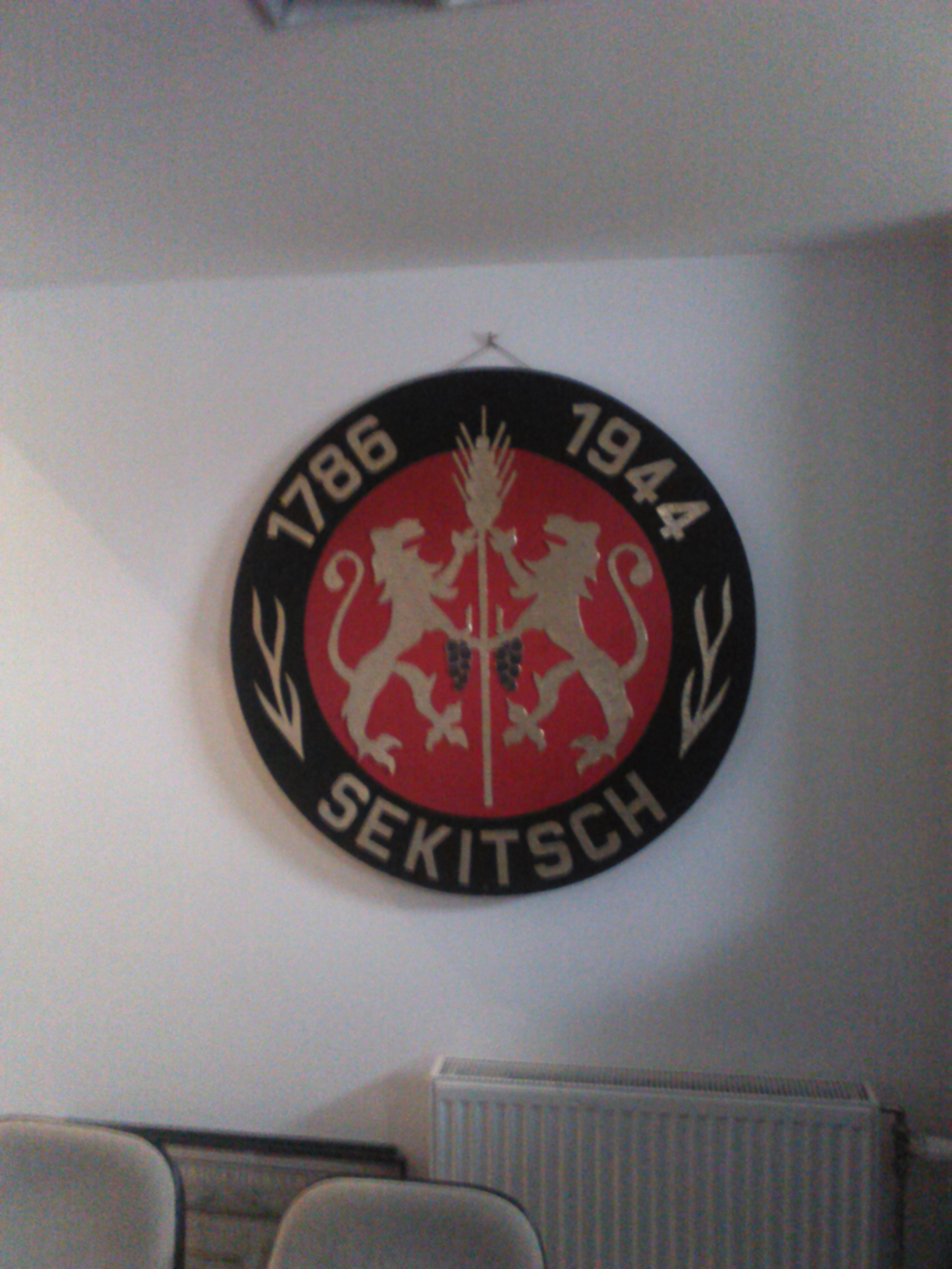 A címer a szeghegyi sváb múzeumban készült (saját készítés)